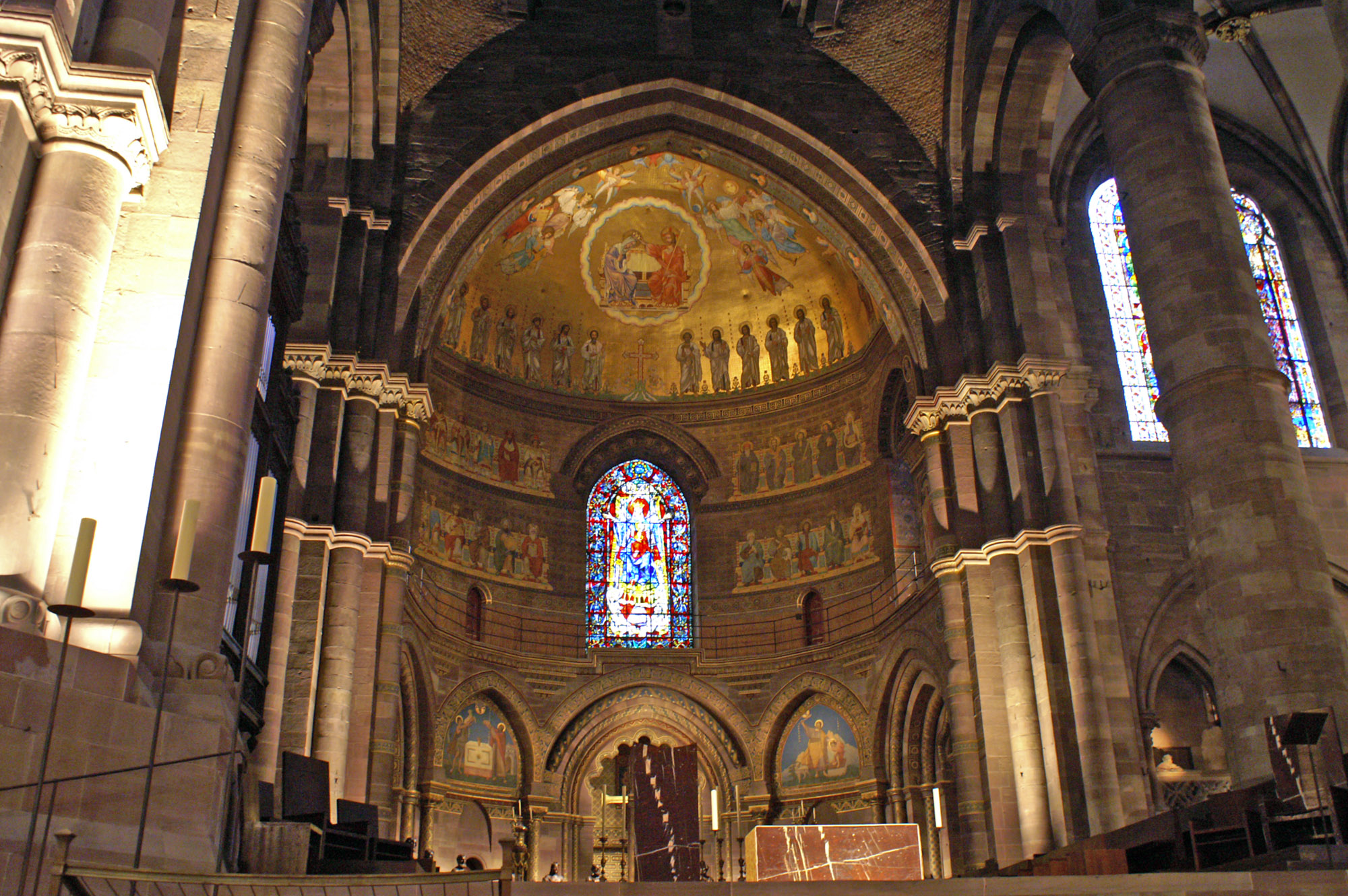 Choeur de la Cathedrale Notre-Dame de Strasbourg - France